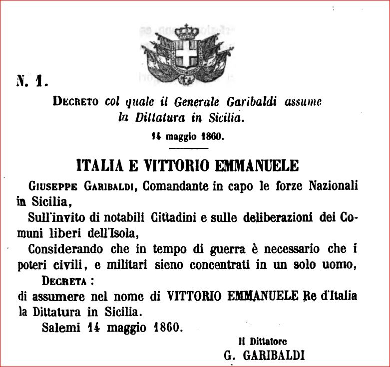 Decreto con cui Garibaldi assume il titolo di Dittatore in Sicilia